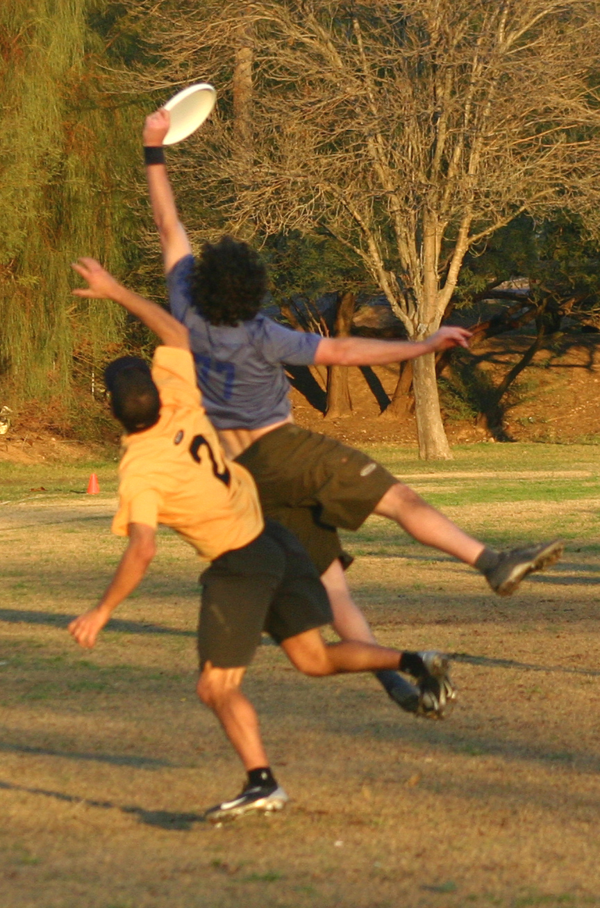 Taken by Jot Powers 2005